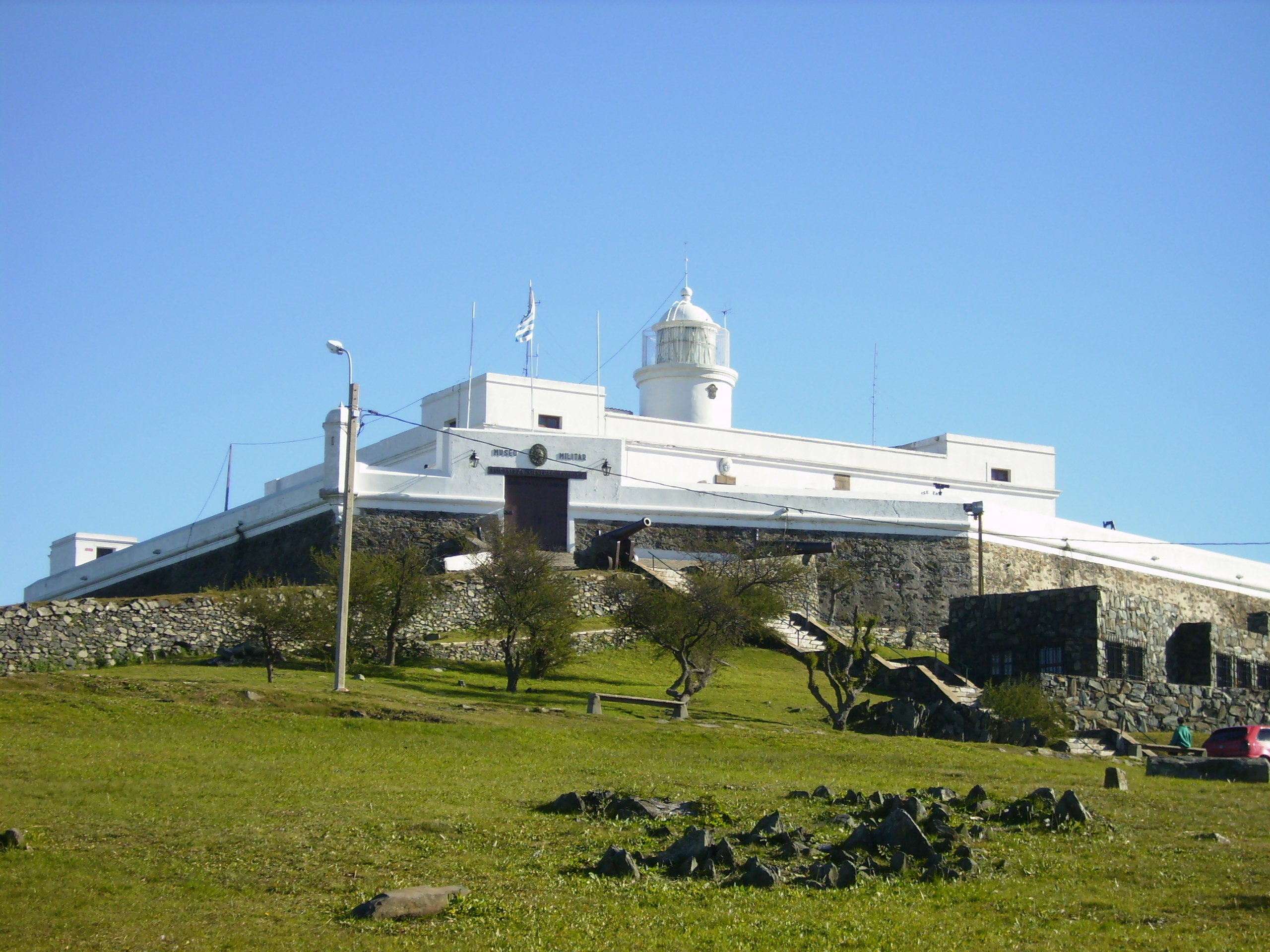 Fortaleza sobre el Cerro de Montevideo, actual museo.